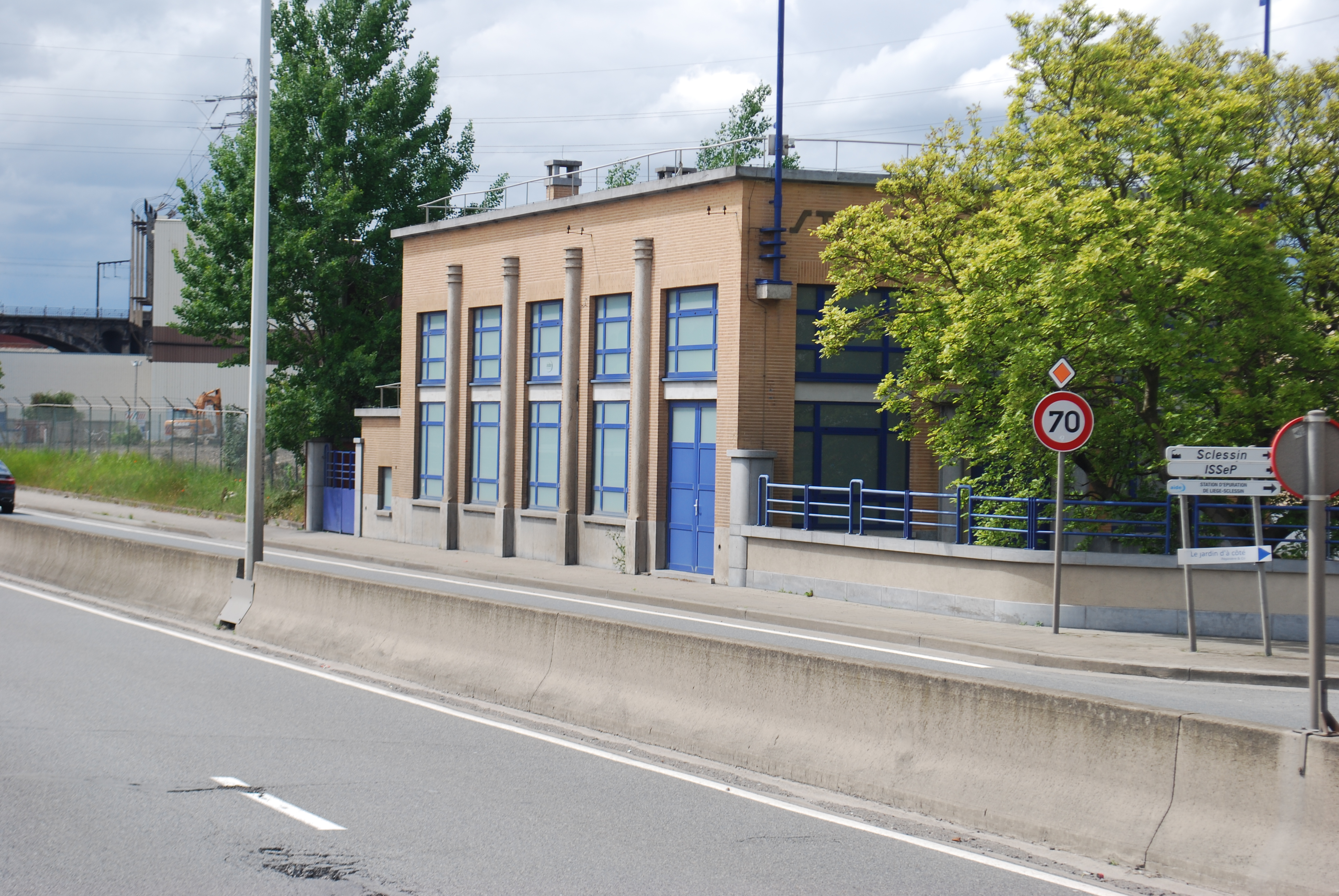 Vue des bords de Meuse à Liège, depuis le quai Timmermans sur la rive gauche.